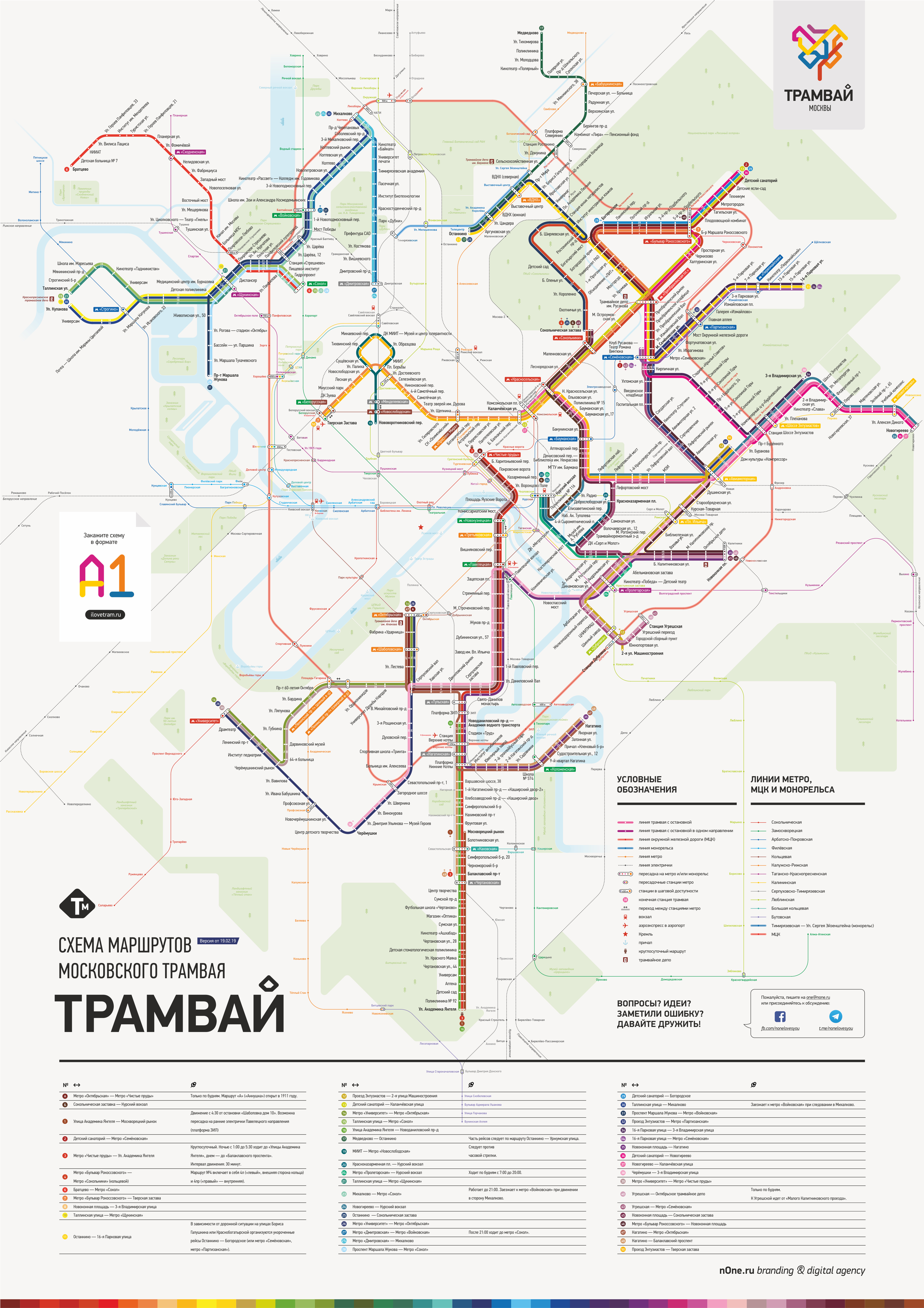 Современная схема сети московского трамвая